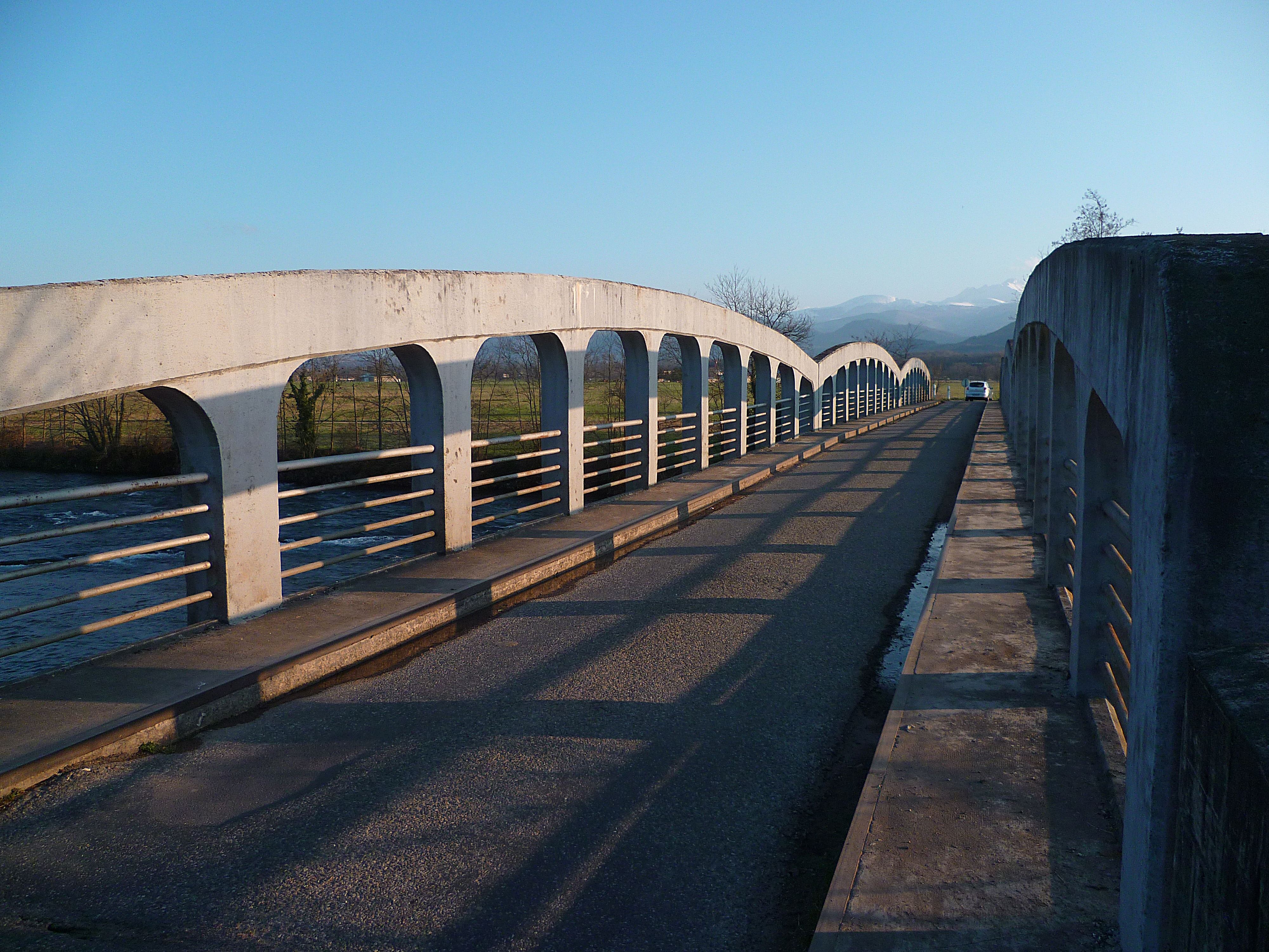 Taurignan-Castet (Ariège, Midi-Pyrénées, France) : Pont sur le Salat.